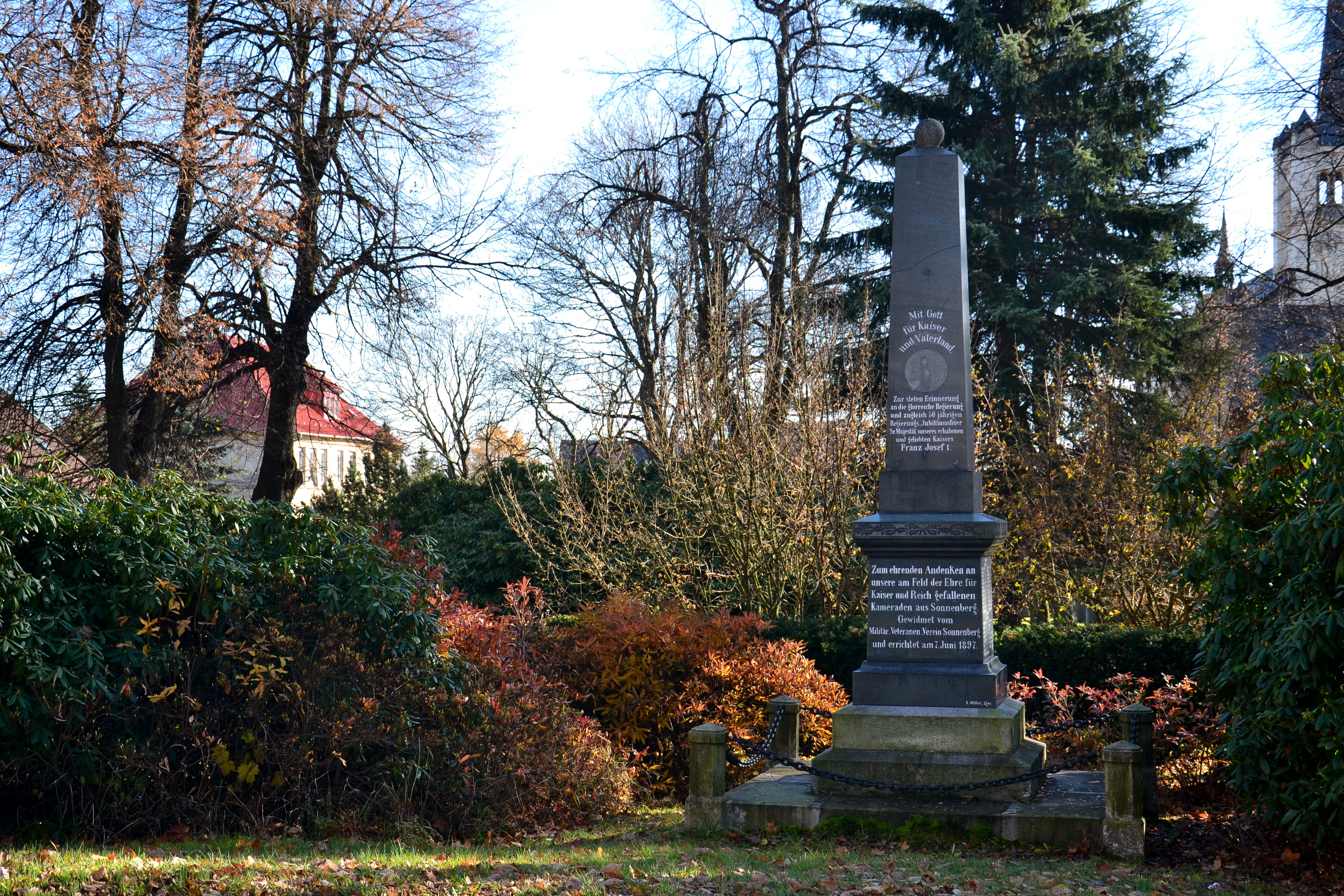 Pomník padlých ve válce roku 1866 a v první světové válce, Výsluní.